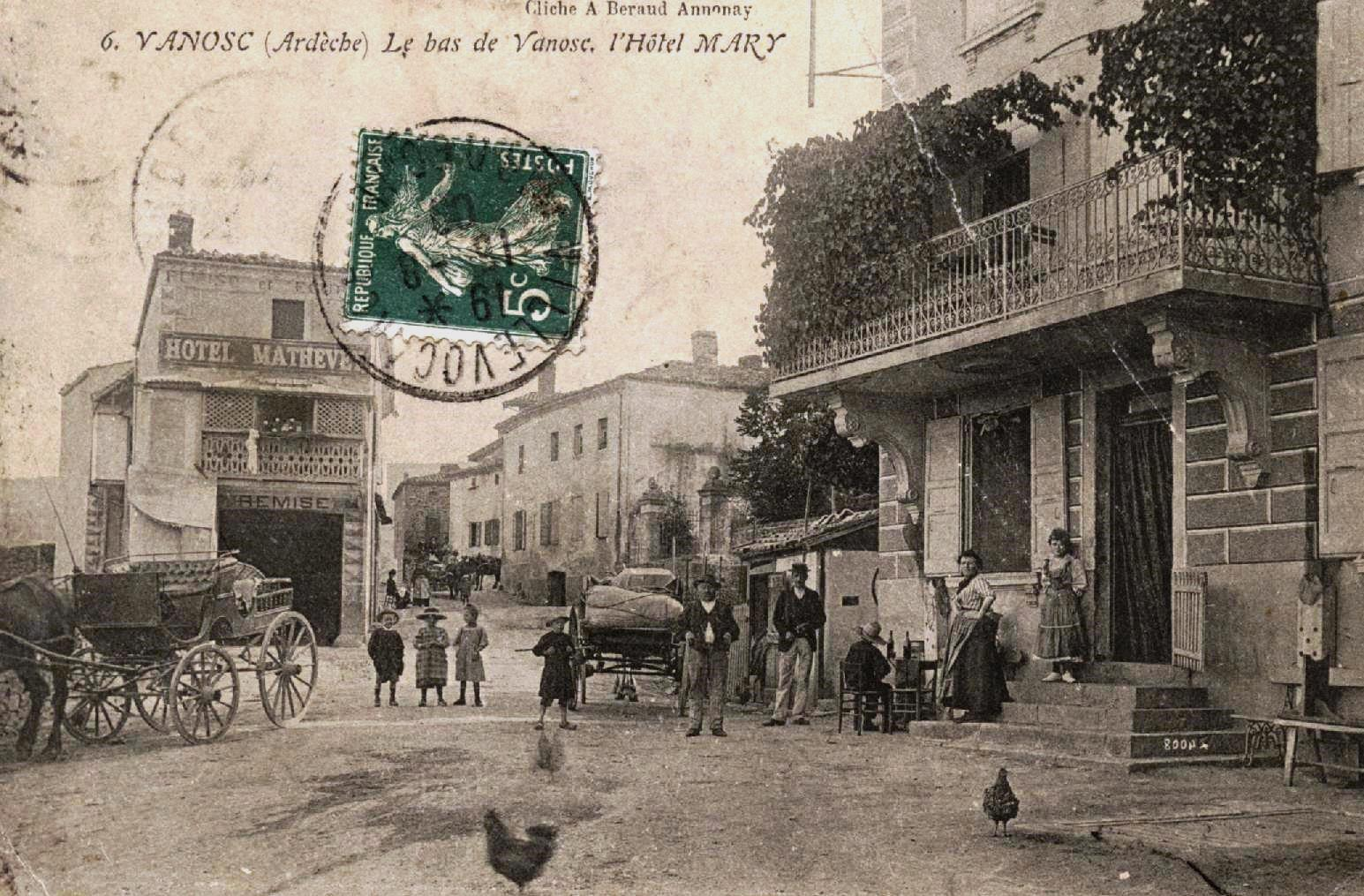 Vanosc CP hôtels